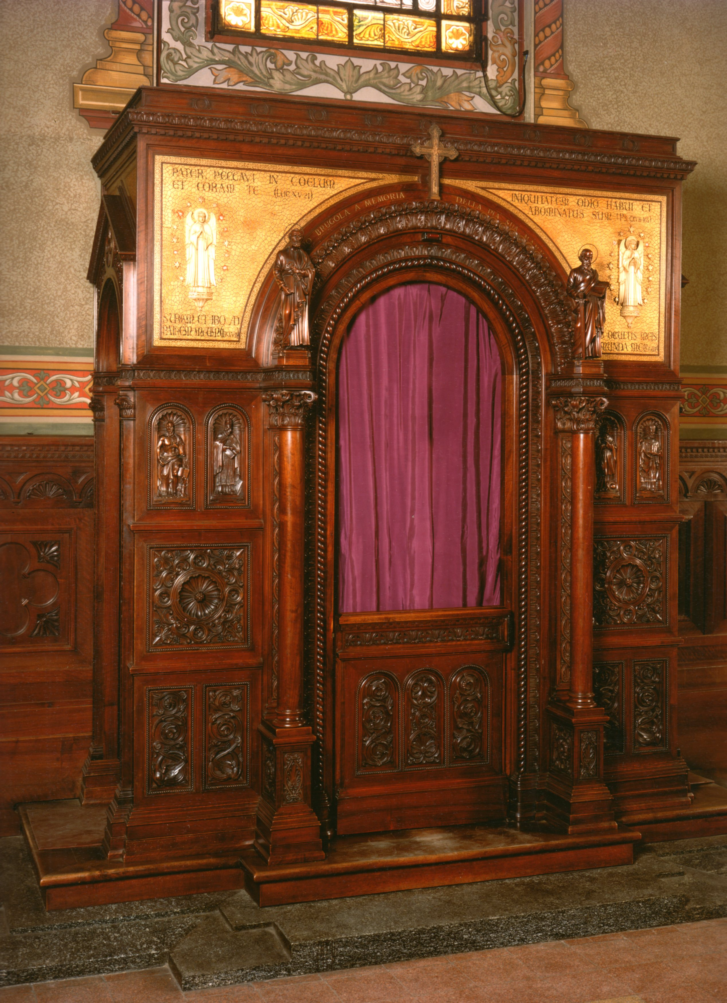 Primo Confessionale finemente intagliato e realizzato da Ambrogio Fossati nel 1940, situato nella navata di sinistra nel Duomo di Lissone.